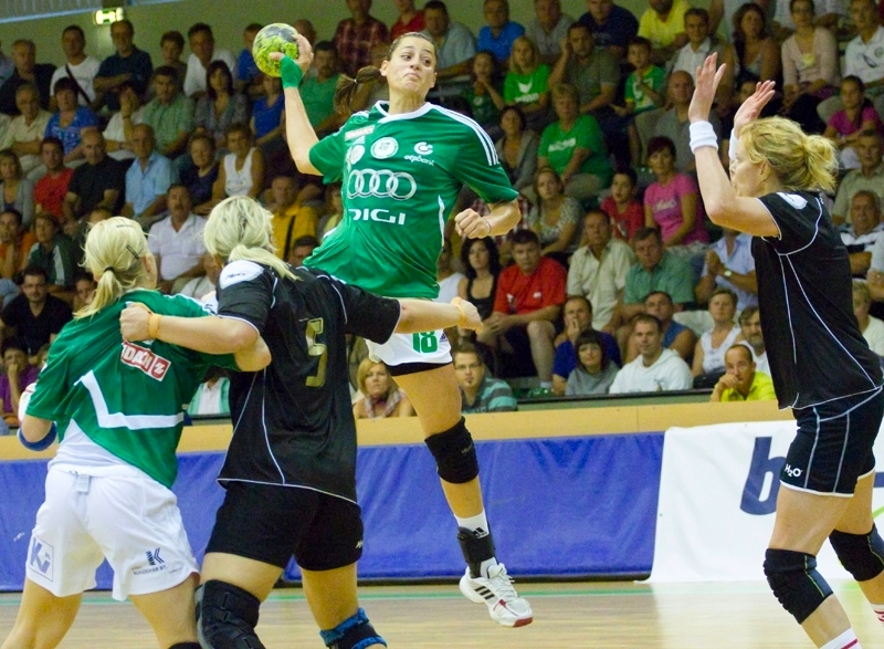 Eduarda Amorim